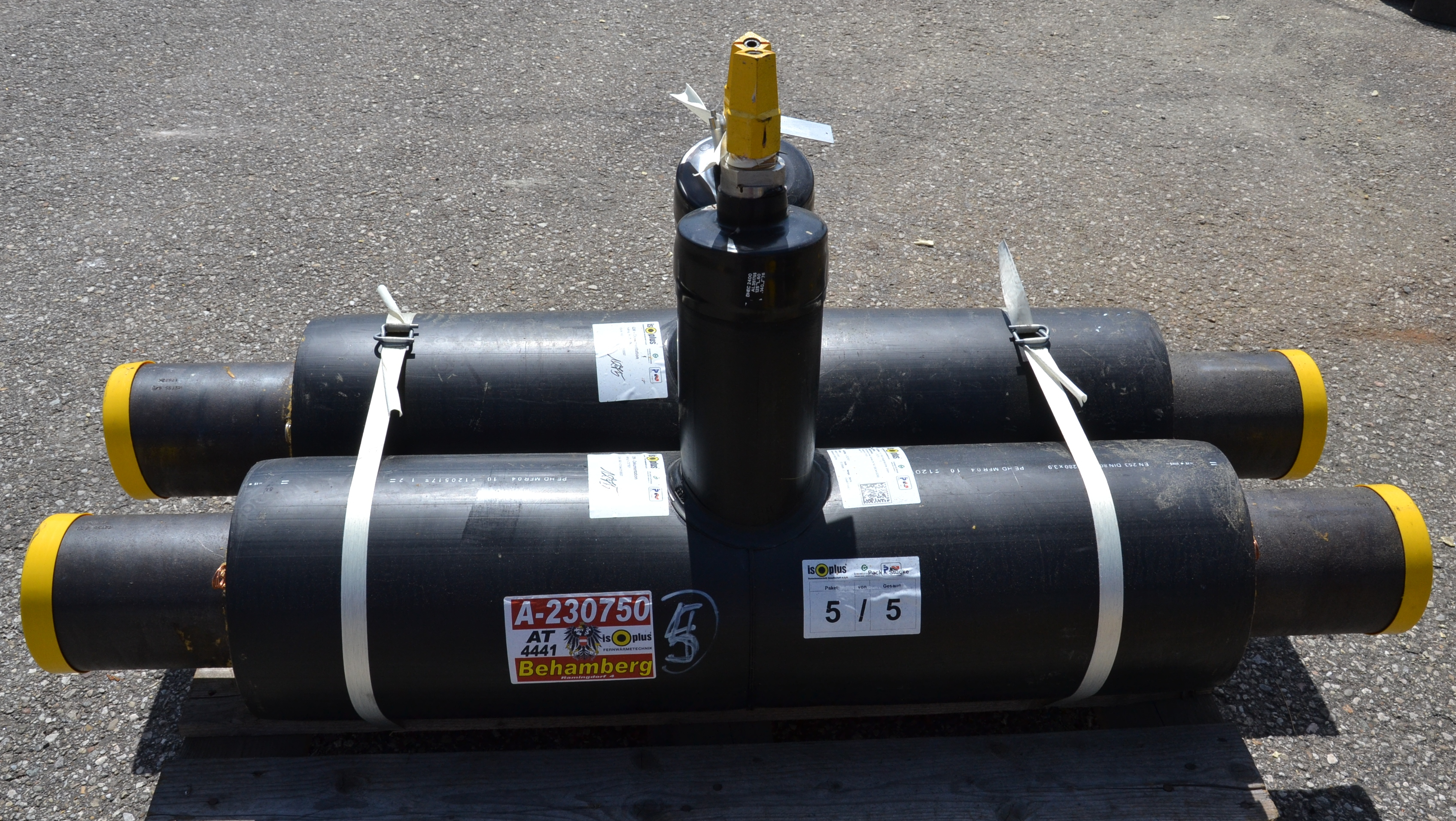 Absperrschieber Fernwärmeleitung